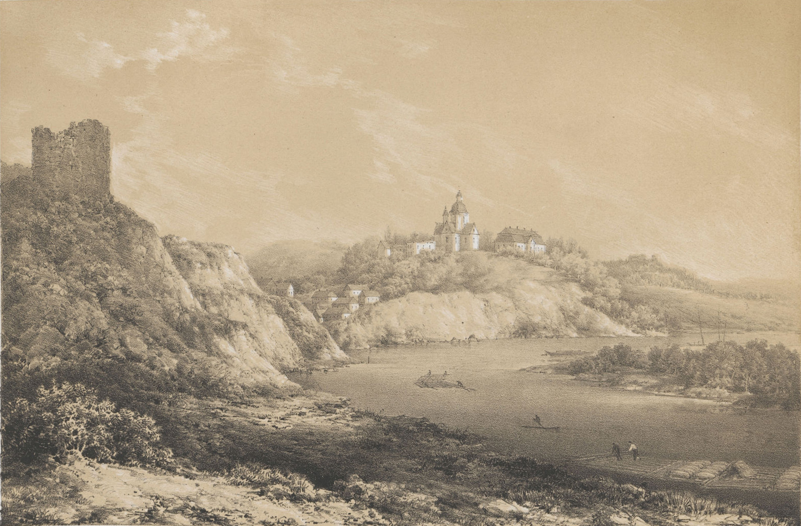 Беларуская (тарашкевіца): Лішкаў (Liškaŭ), рака Нёман (Nioman)